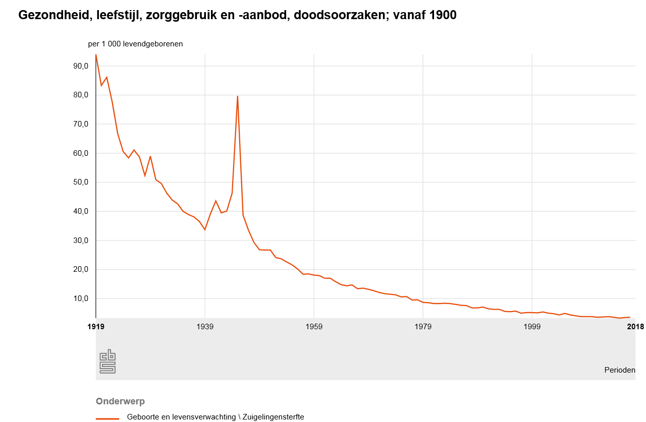 Zuigelingensterfte vanaf 1900